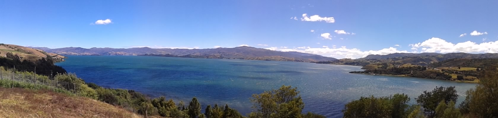 Panorámica Lago de tota.